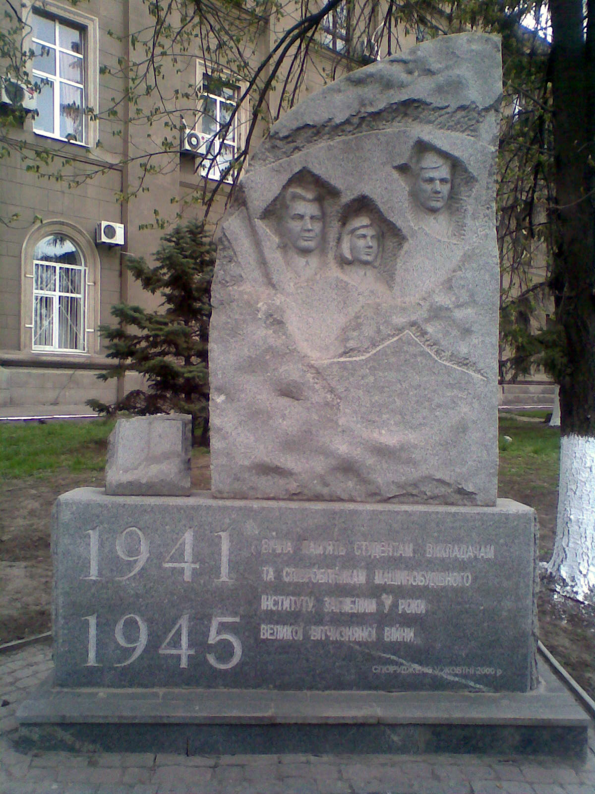 Памятник студентам, преподавателям и сотрудникам Запорожского Национального Технического Университета погибшим в годы Великой Отечественной войны.